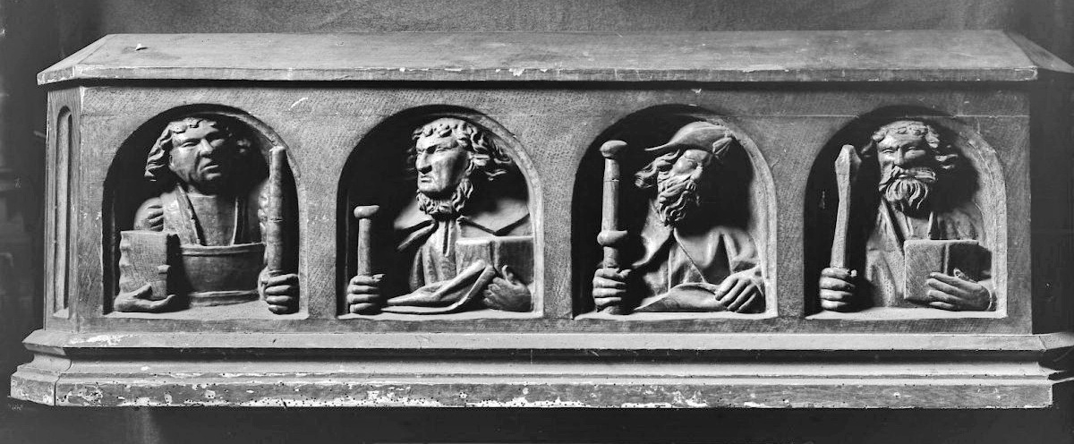 Schatkamer Sint-Servaaskerk: houten kist gemaakt van delen van een apostelbalk, mogelijk afkomstig uit de afgebroken Sint-Jacobskapel aan het Vrijthof. Van links naar rechts: Judas Taddeüs, onbekend, Jakobus de Meerdere, Jakobus de Mindere.